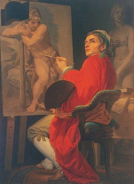 Domenico Corvi Autoportrait 1875 env